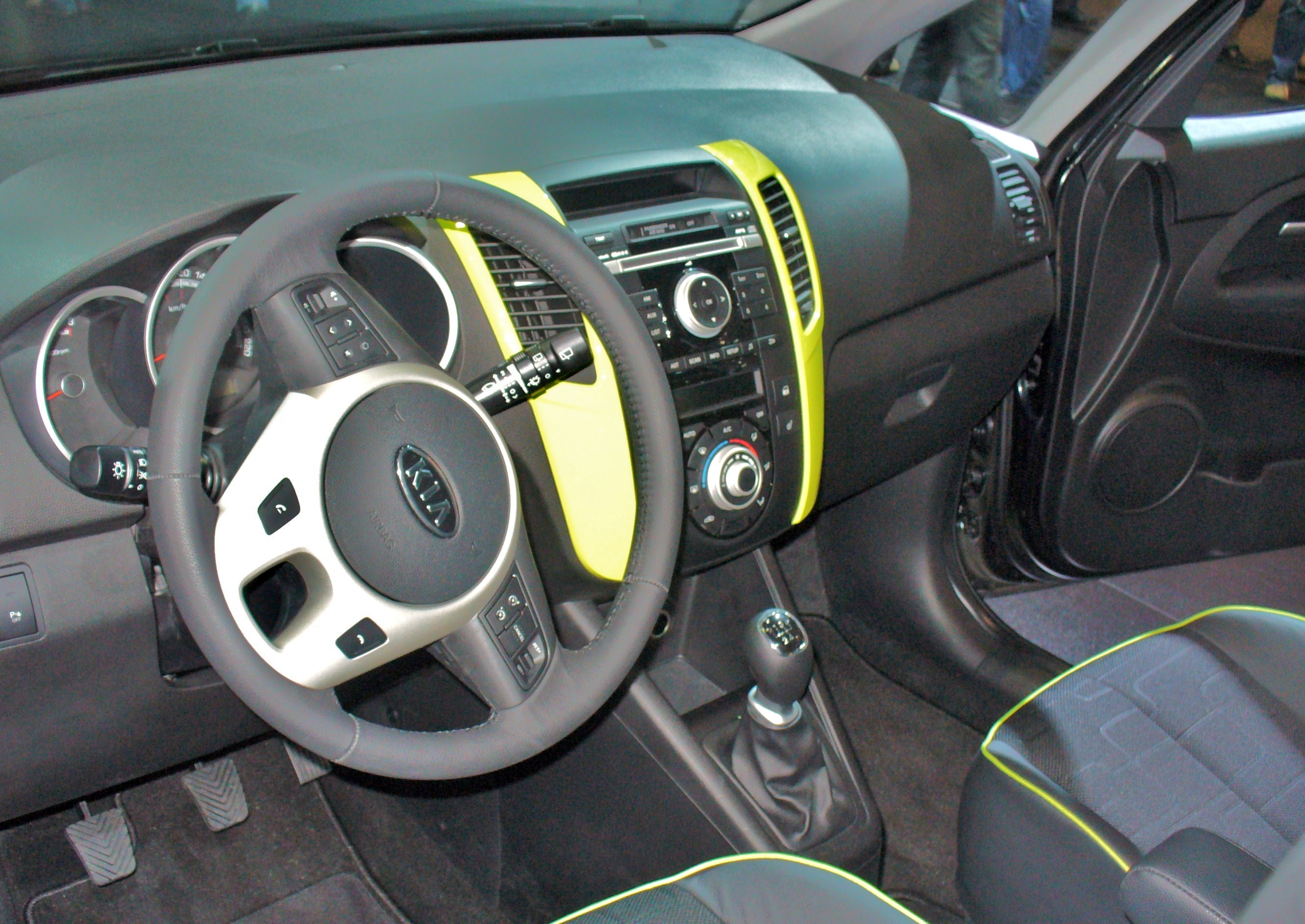 Kia Venga